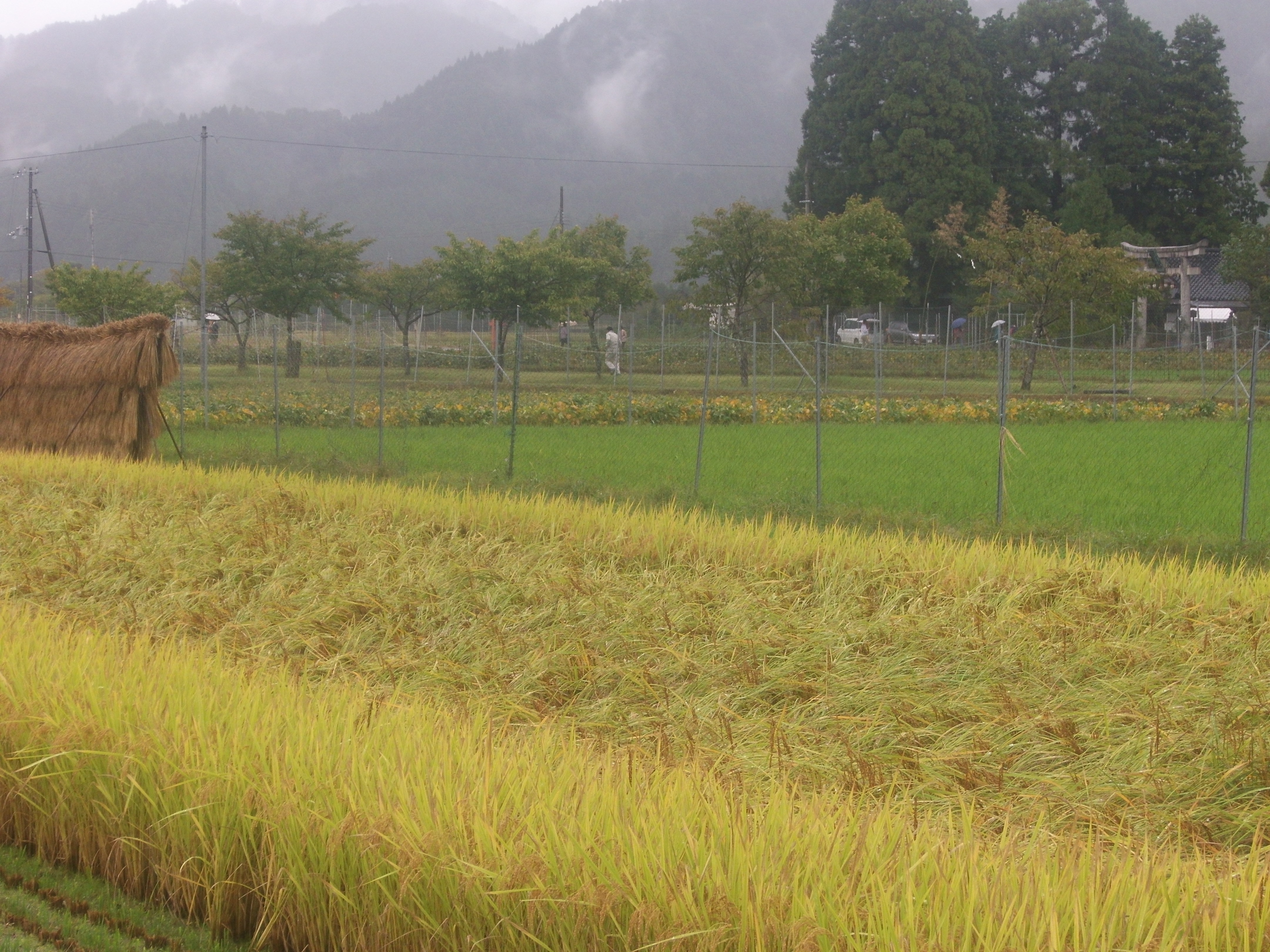 長らく途絶えていた大嘗祭を東山天皇が1687年（貞享4年）に復興した際、最初の主基田として選ばれたのが禁裏御料であった現在の右京区京北鳥居町。背後に山国神社が見える。